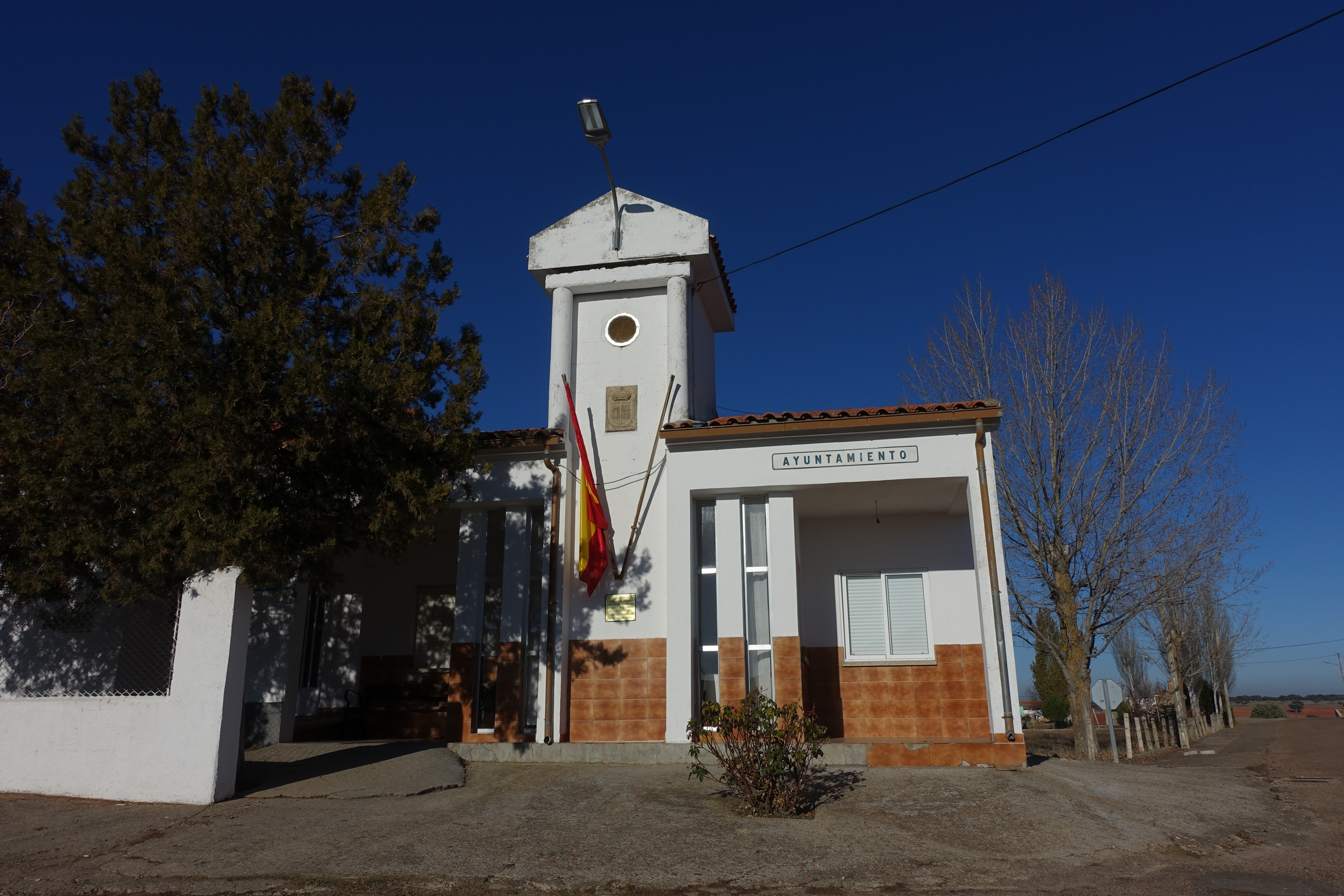 Casa consistorial de La Sagrada (Salamanca, España).